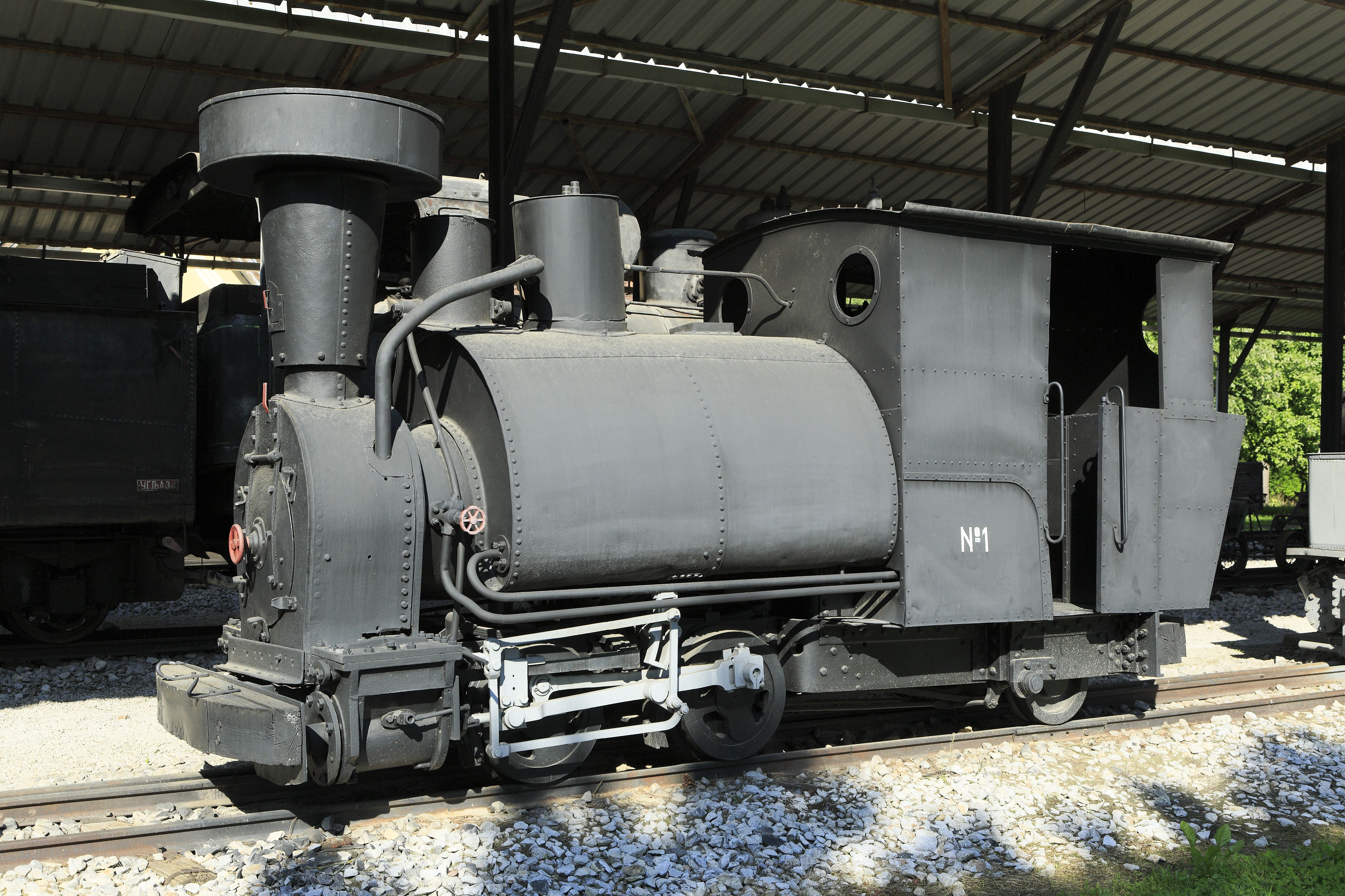 Das Fahrzeug macht einen ausgesprochen britischen Eindruck. Möglicherweise ist die Achsfolge B1 n2t, sofern die Laufachse nicht seitenverschiebbar ist.